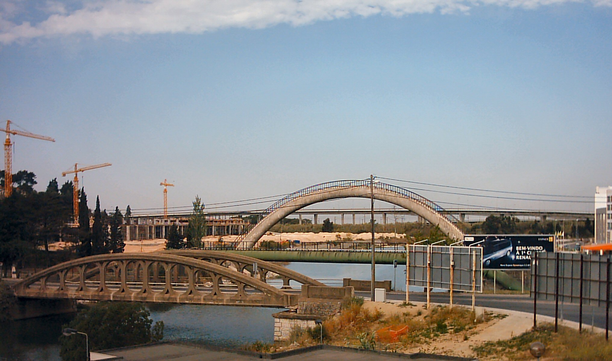 Ponte sobre o Rio Trancão em Sacavém Source: self